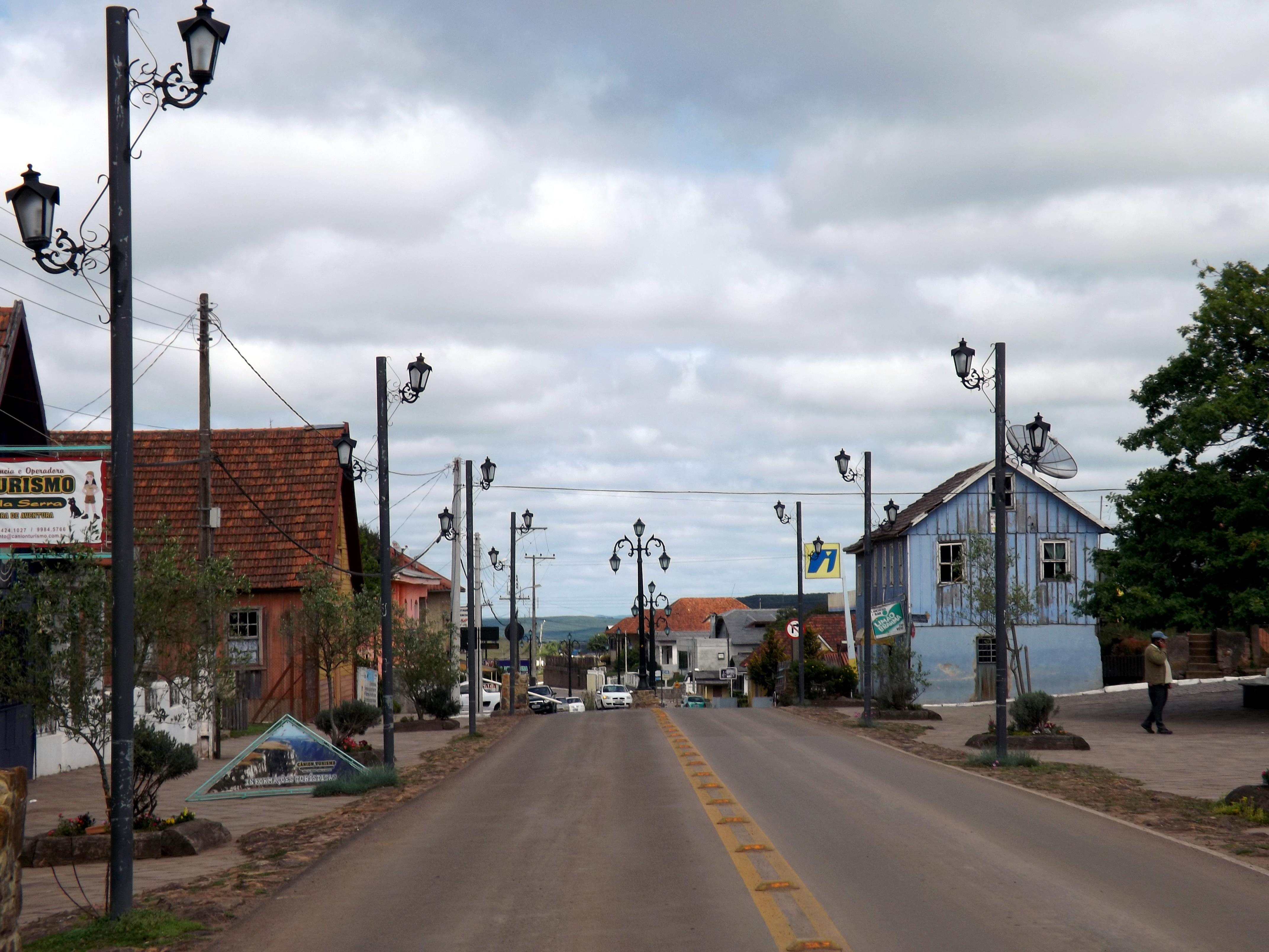 Cambará do Sul - Centro